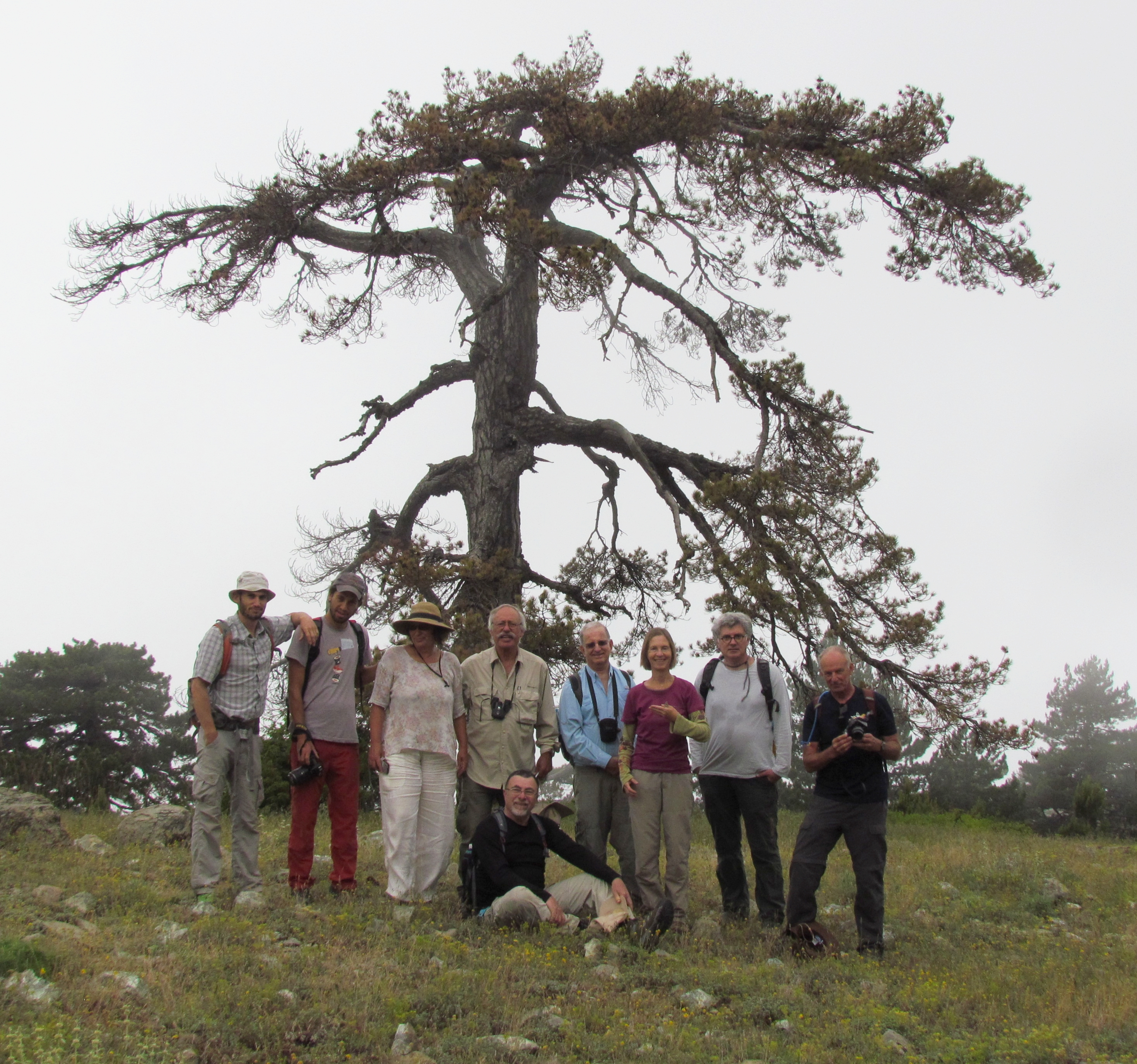 אגודת חובבי הפרפרים בהרי אמנוס, חבל האטיי בדרום טורקיה, ב-21.6.2104